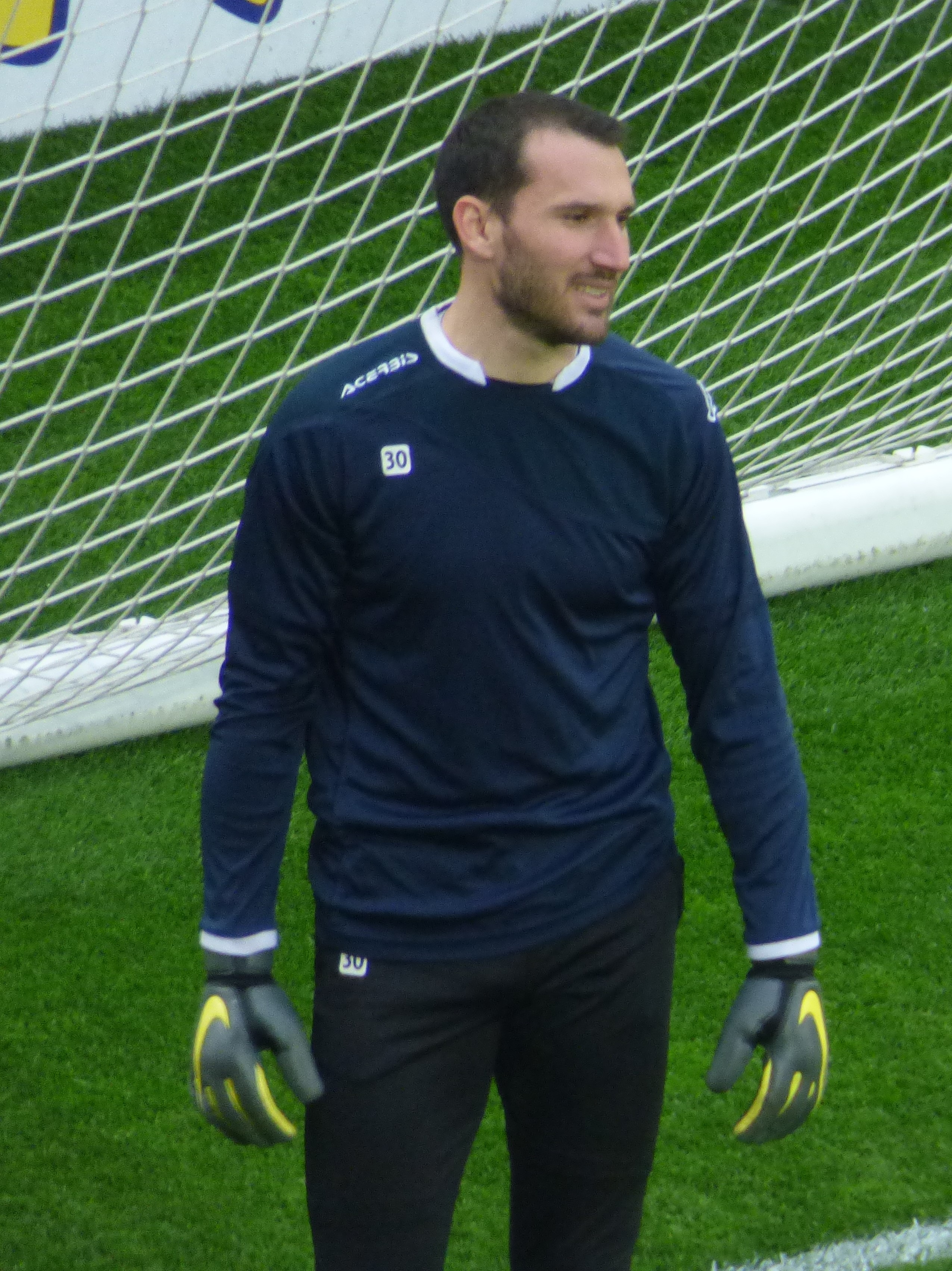 Thomas Vincensini avant le match Lens-Valenciennes, comptant pour la 32ème journée du championnat de France de football de Ligue 2 2018-2019, le 12 avril 2019, au Stade Bollaert-Delelis.